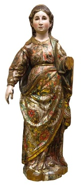 Escultura de la Santa Eulàlia que s'atribueix al retaule de Sant Feliu de Guíxols. Actualment es troba al Museu d'Art de Girona.